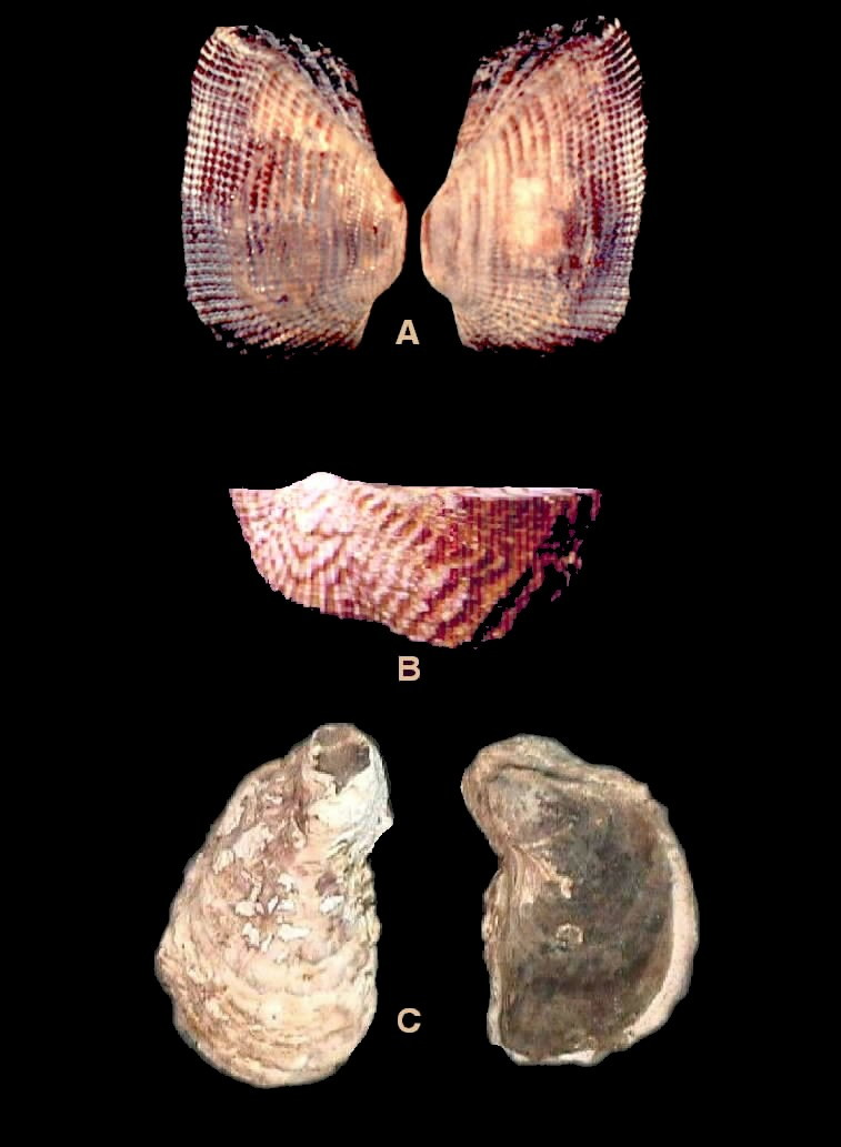 Fotos de Moluscos del estado Falcón - Venezuela A. Arca imbricada B. Arca zebra C. Crassostrea rhizophorae